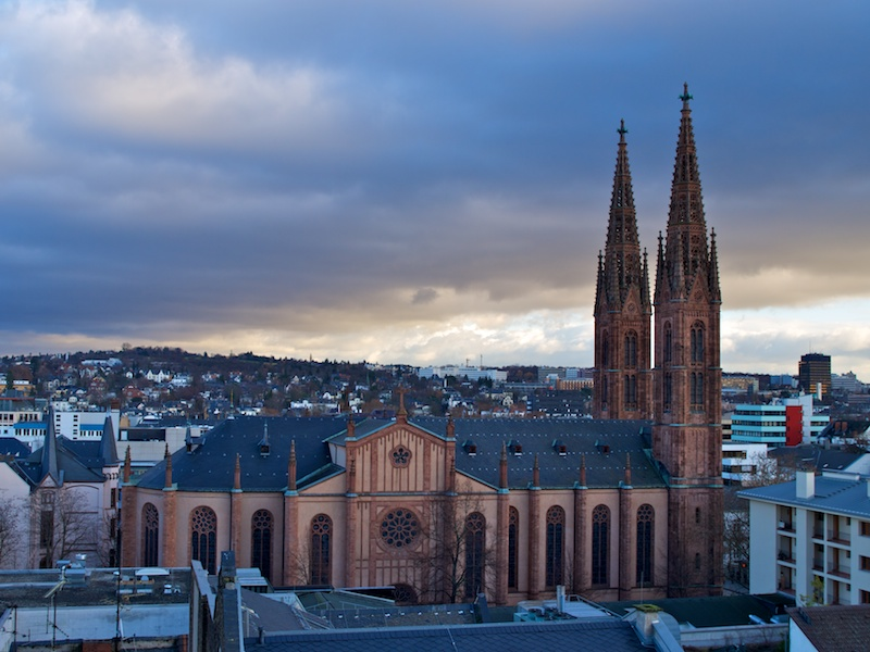 Ansicht von Westen, St. Bonifatius, Wiesbaden.